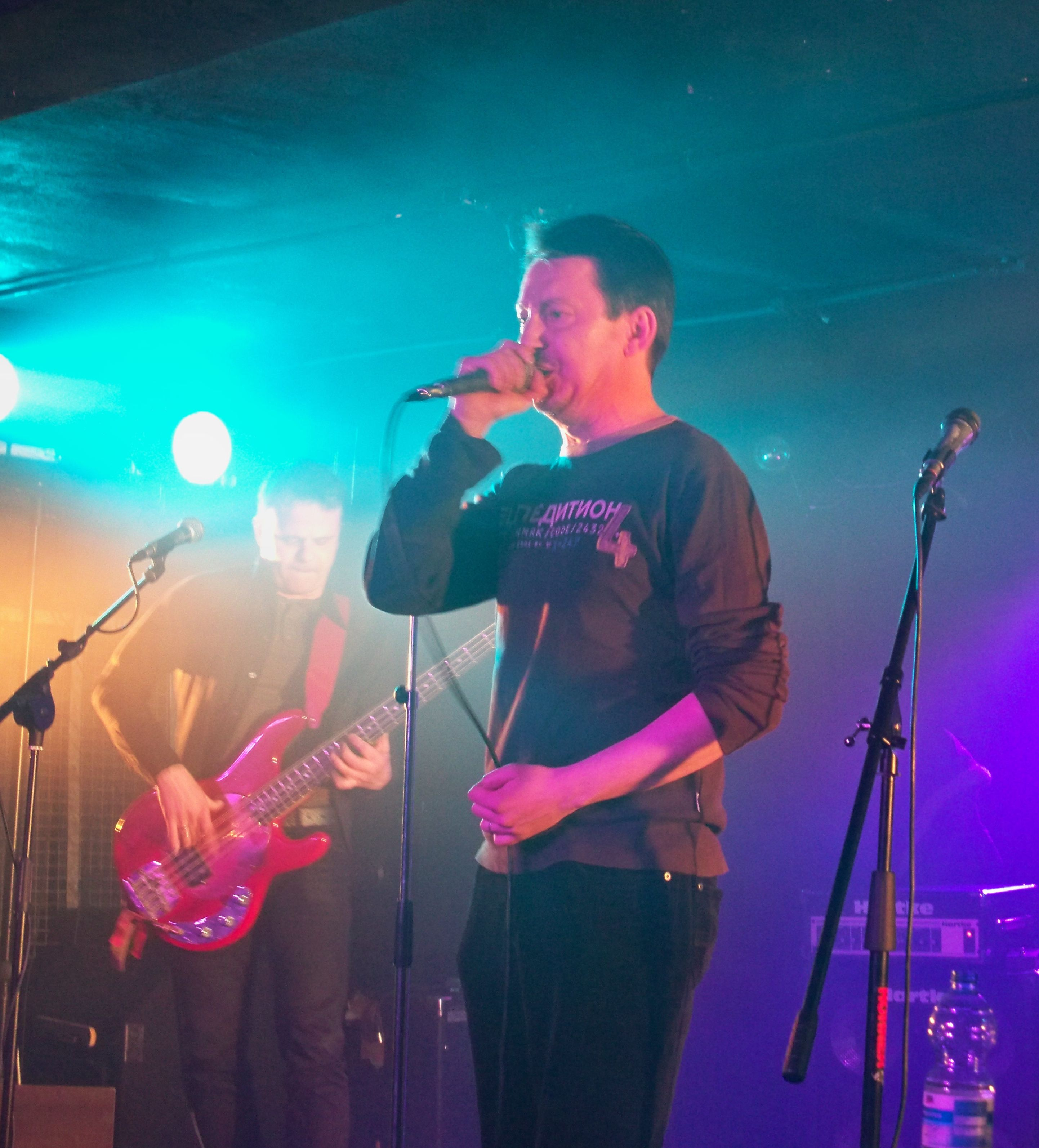 Koncert "Kolaborantów" w warszawskim klubie Fonobar. 4 kwietnia 2013 r. Na pierwszym planie Przemysław Thiele.